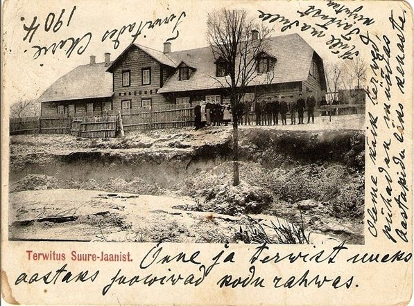 Suure-Jaani kihelkonnakooli maja aadressil Viljandi (praegu Köleri) 1 Suure-Jaani. Postkaart aastast 1903.